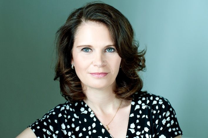 Offizielles Portraitfoto der Politikerin Saskia Ludwig.